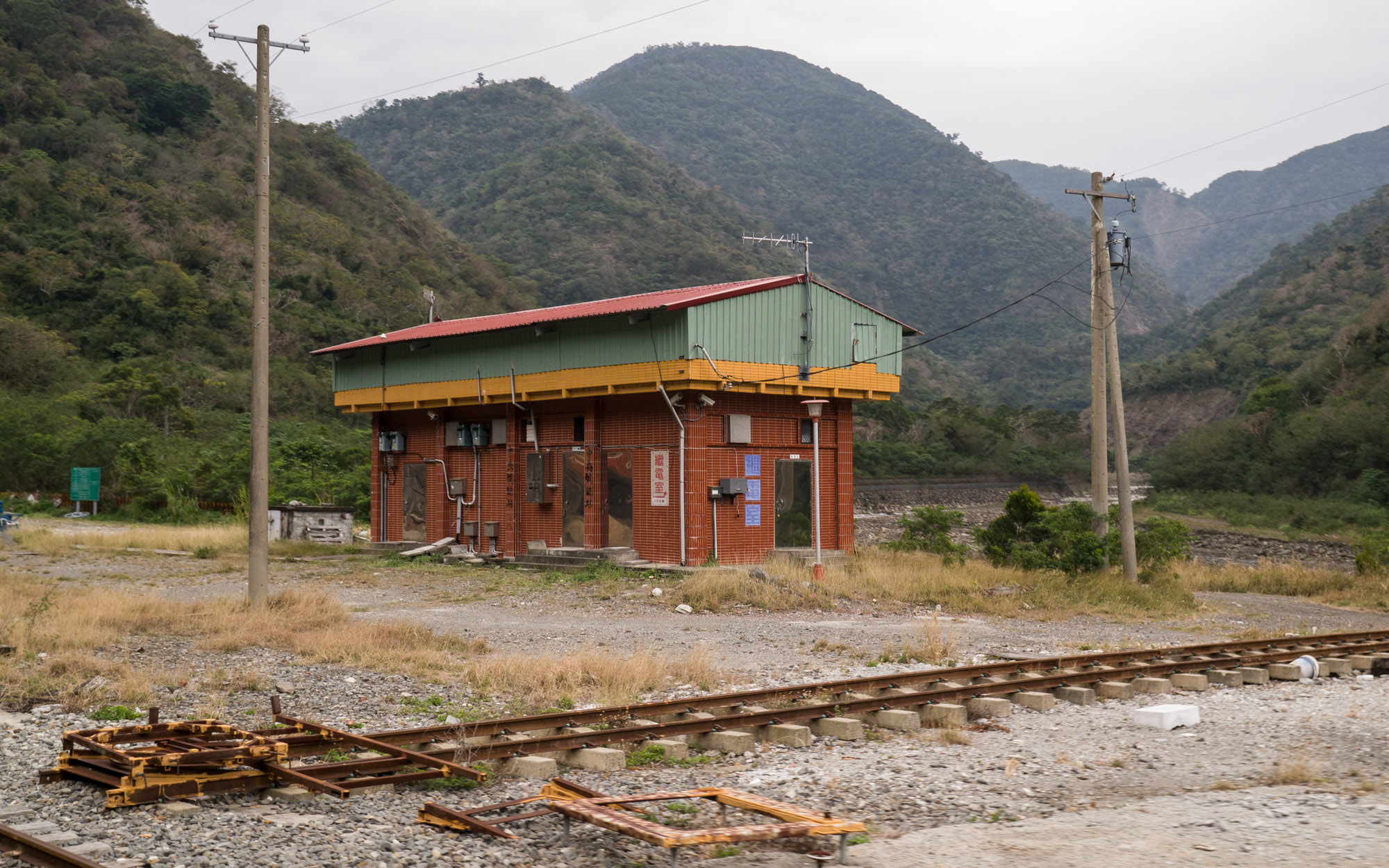 臺灣鐵路管理局中央號誌站繼電室。